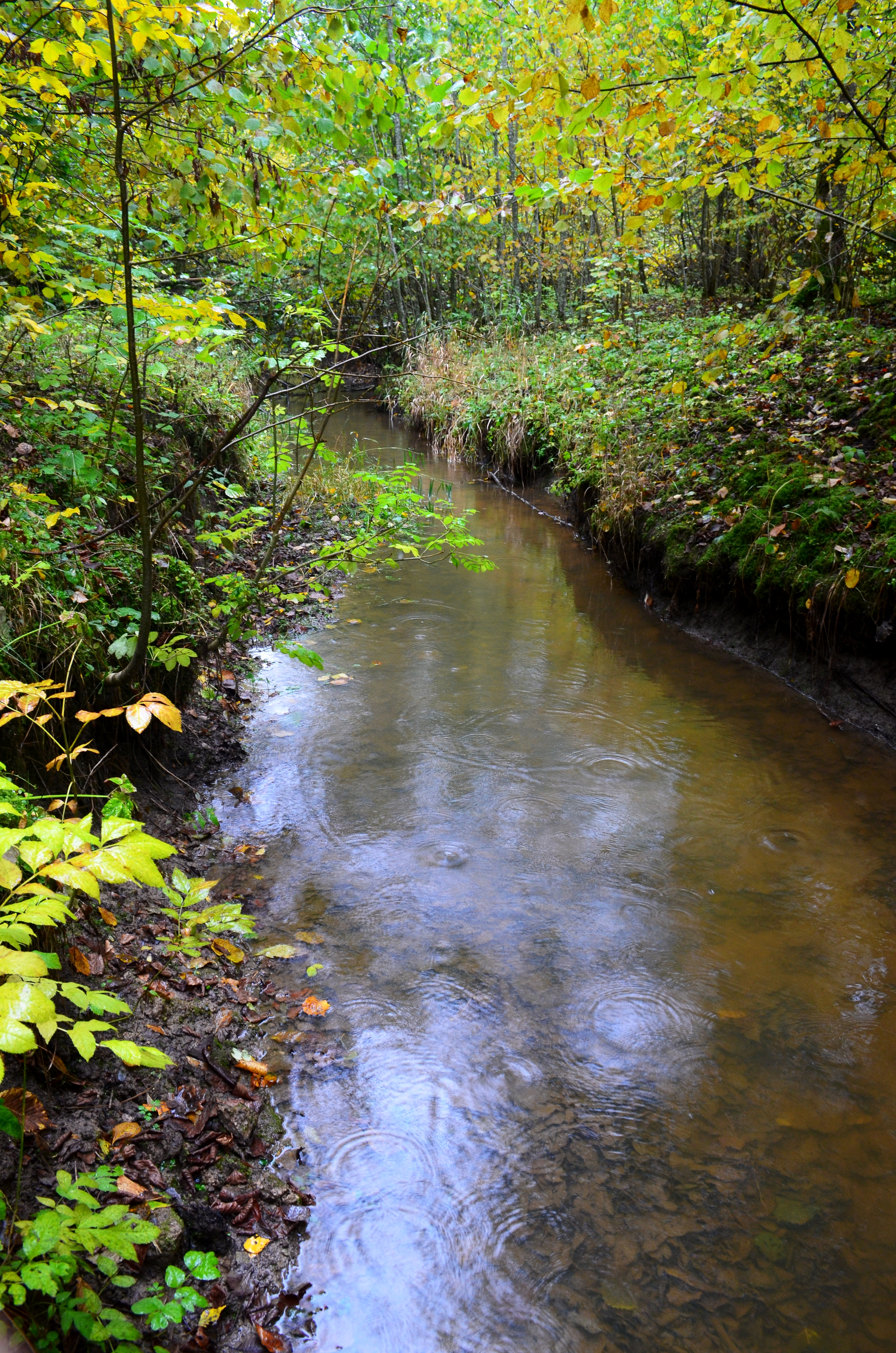 Vaineikupis Vaineikių miške, Kretingos raj.